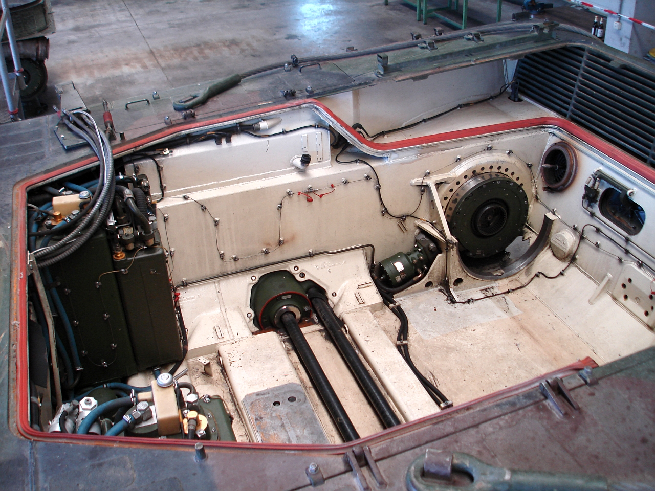 Triebwerkraum eines Leopard 2A5. Zu sehen sind mittig zwei Drehstäbe und links ein Teil der Kraftstoffanlage (2 grüne Behälter).